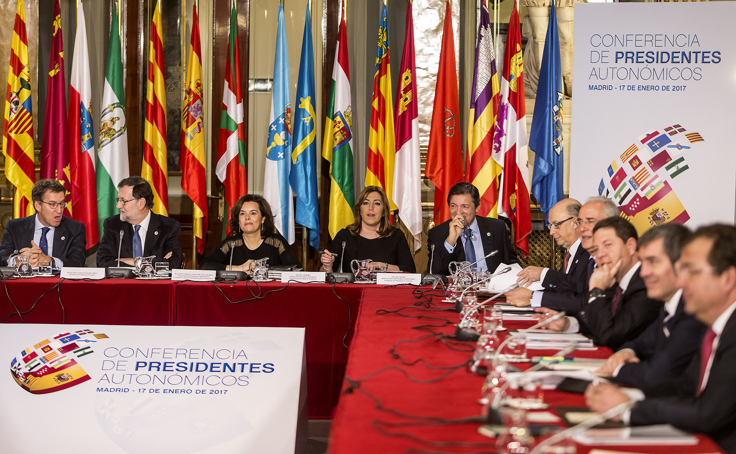 Conferencia de presidentes autonómicos en enero de 2017 en Madrid